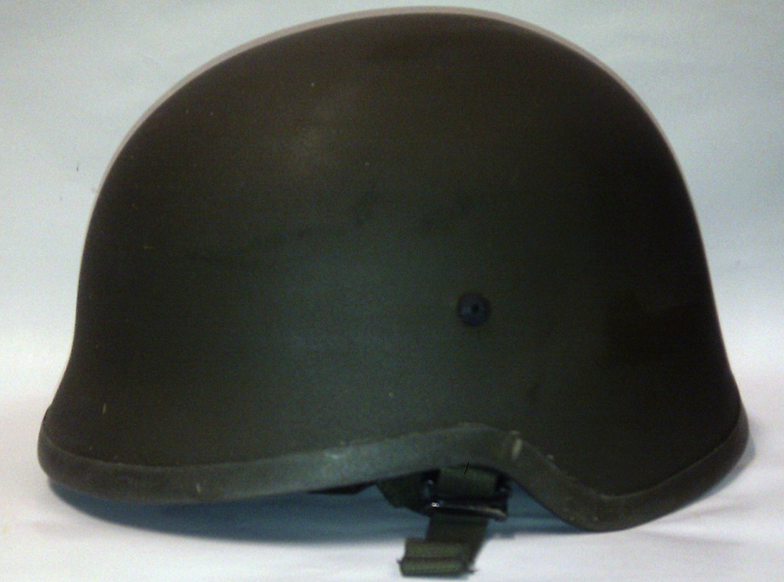 Gefechtshelm M92